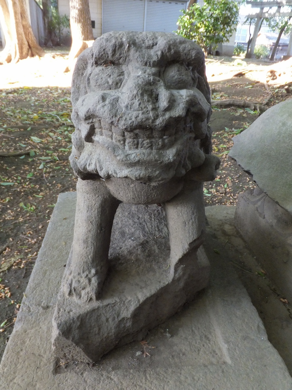 天神社（西東京市）の古い狛犬（左） 2016年4月29日撮影